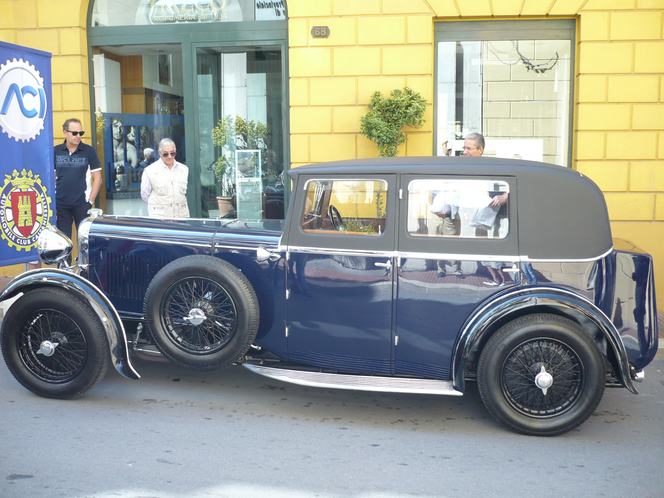 Lagonda 16 80 berlina carrozzata Weimann, prodotta nel 1928 con una prima immatricolazione nel 1932, successivamente immatricolata in Italia nel 1967. Auto iscritta all'ASI n.0574 nel 1971. Motore 6 cilindri in linea di 2.000 di cilindrata; catteratteristici i parafanghi a “motociclista”.